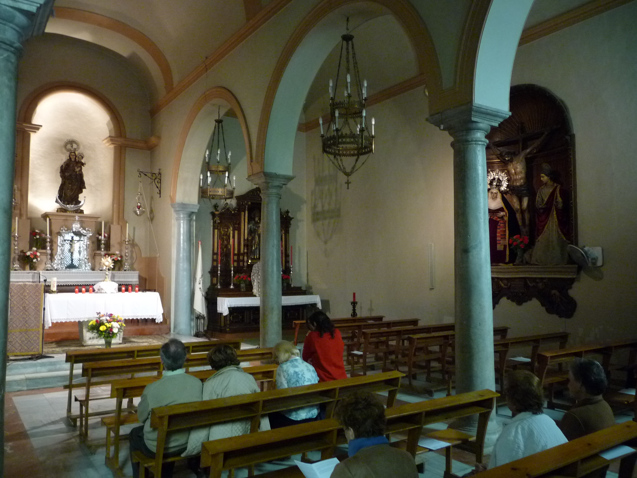 Capilla del Señor de la Puerta Real in Jerez de la Frontera